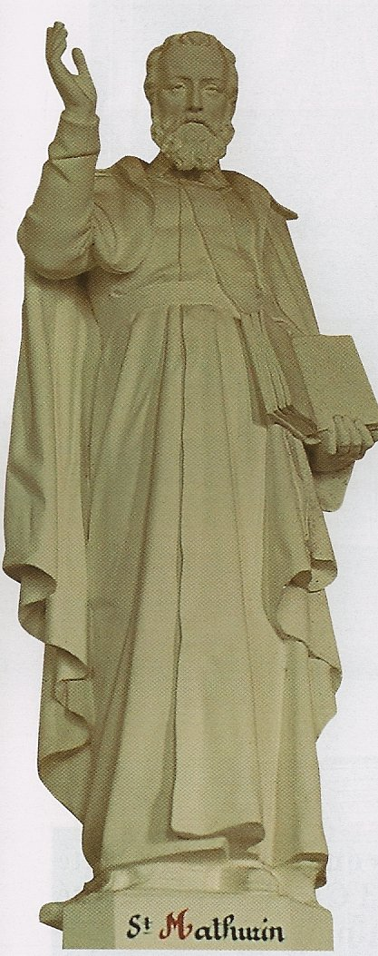 Statue de Saint Mathurin dans l'église de Tessy-sur-Vire